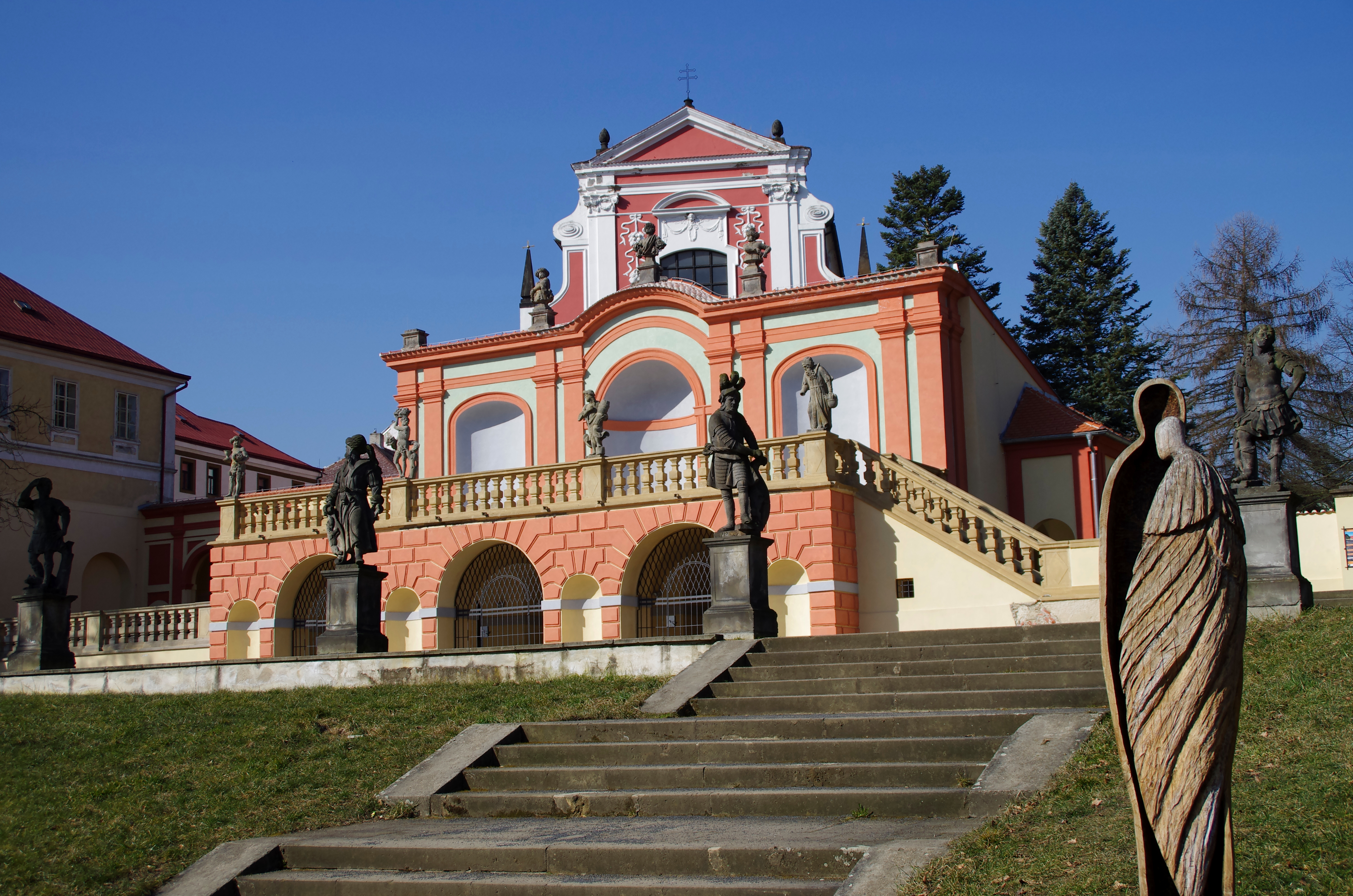 Letohrádek sala terrena u zámku